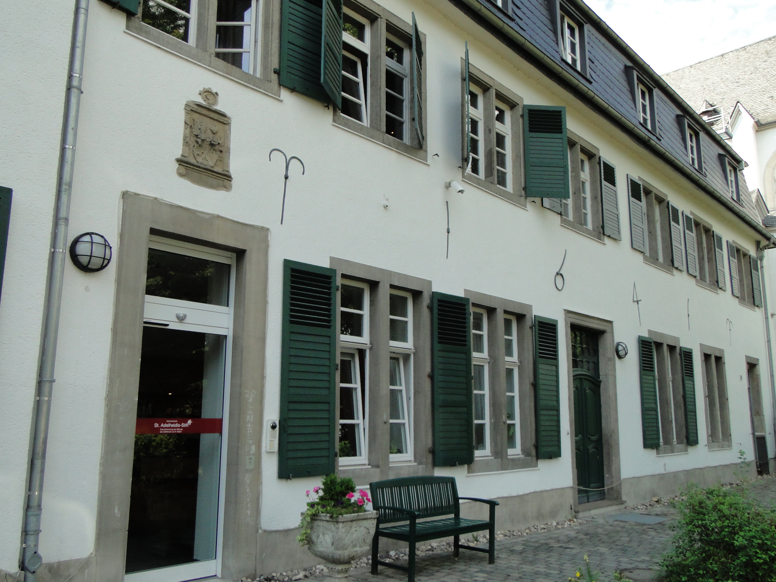 Vilich; Adelheidisstift, gegründet 978. Die erste Äbtissin war die heilige Adelheid.